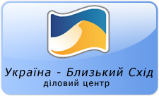 Логотип Ділового Центру «Україна - Близький Схід»